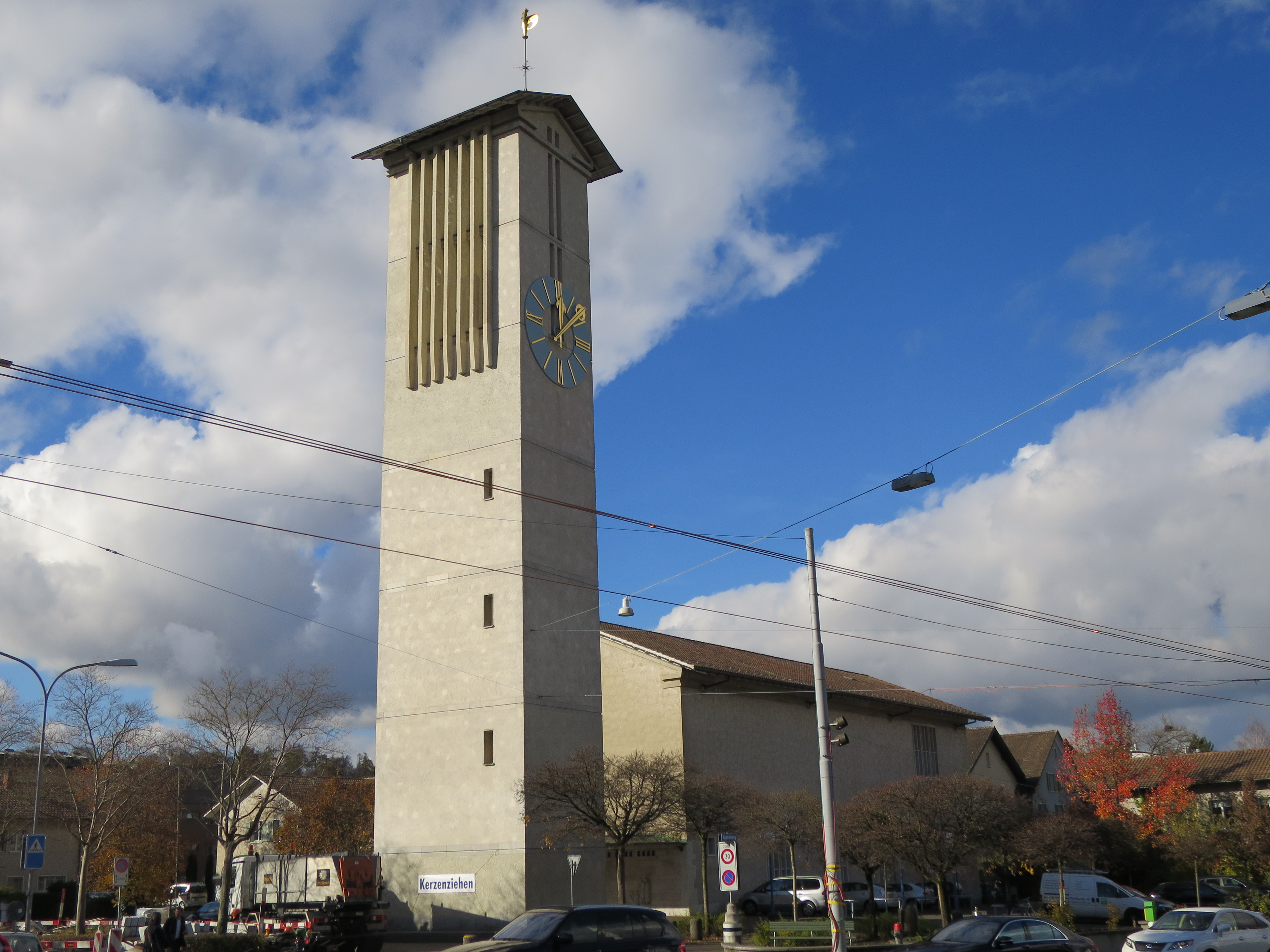 Reformierte Kirche Zürich-Balgrist (1951-52)